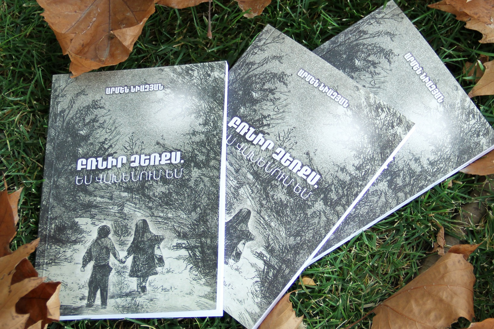 «Բռնիր ձեռքս. ես վախենում եմ» գիրք